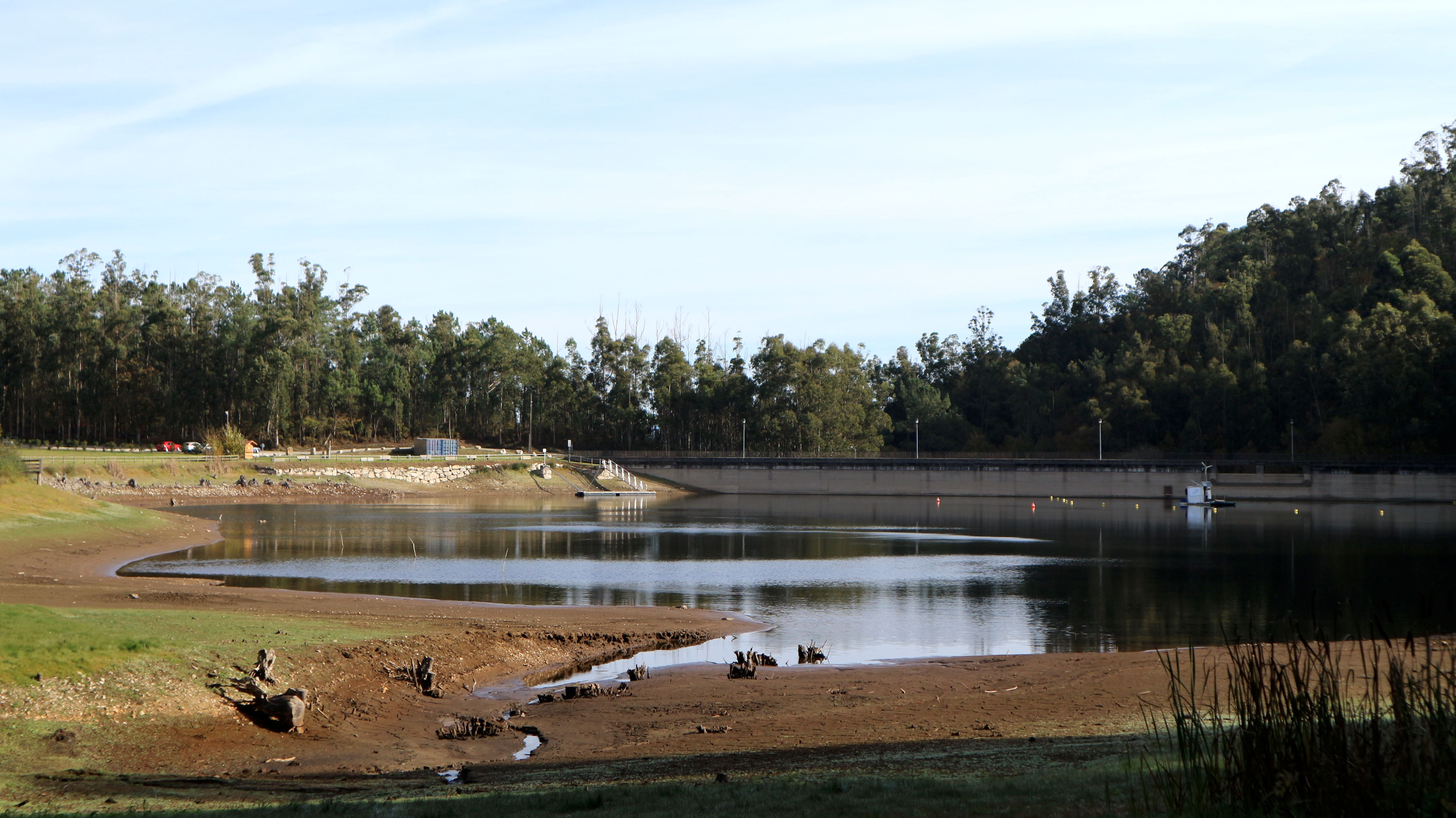 Encoro de Beche, en Folgoso, Abegondo.